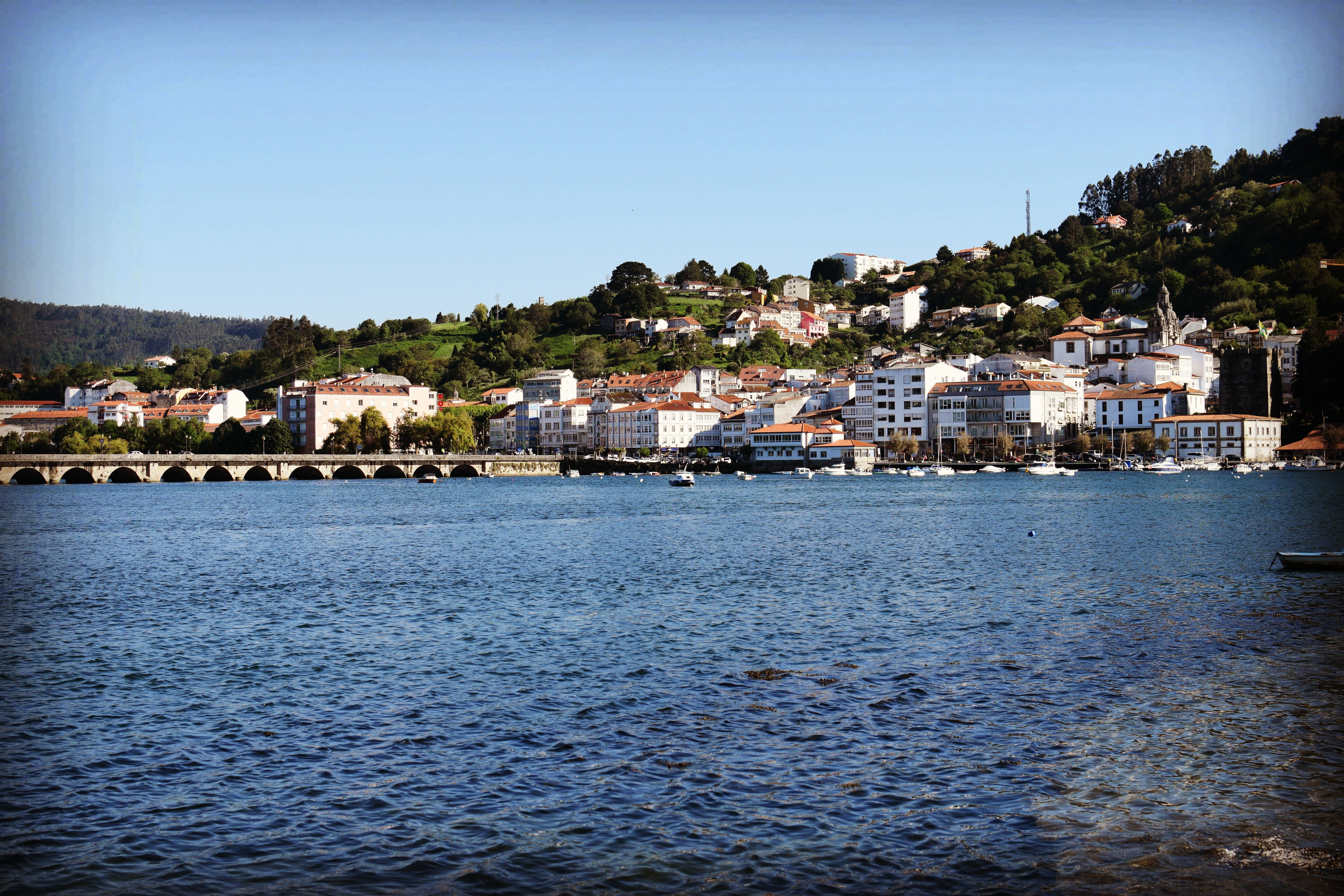 Vista del pueblo de Pontedeume desde Cabanas